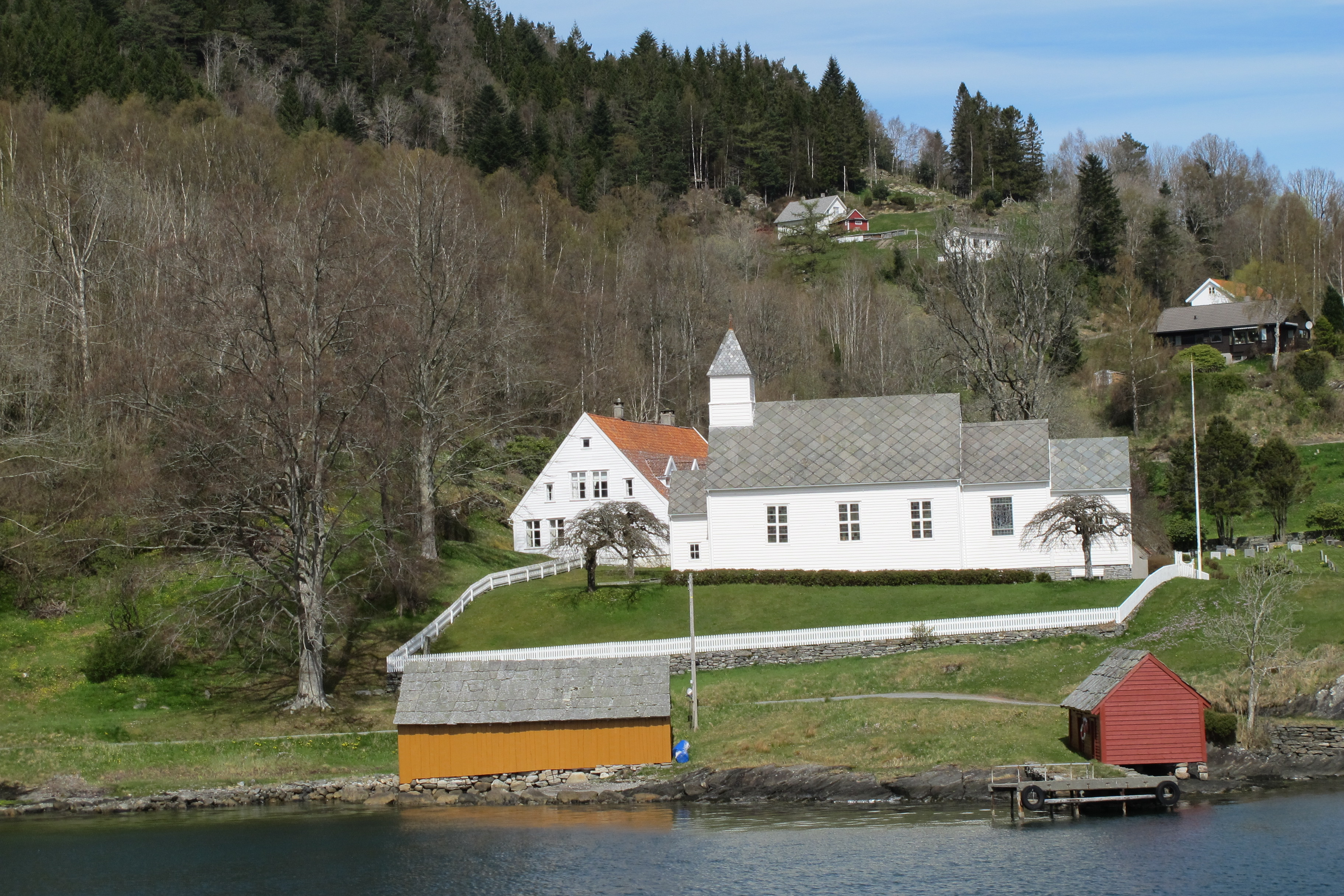 Fjelberg kyrkje, mai 2017